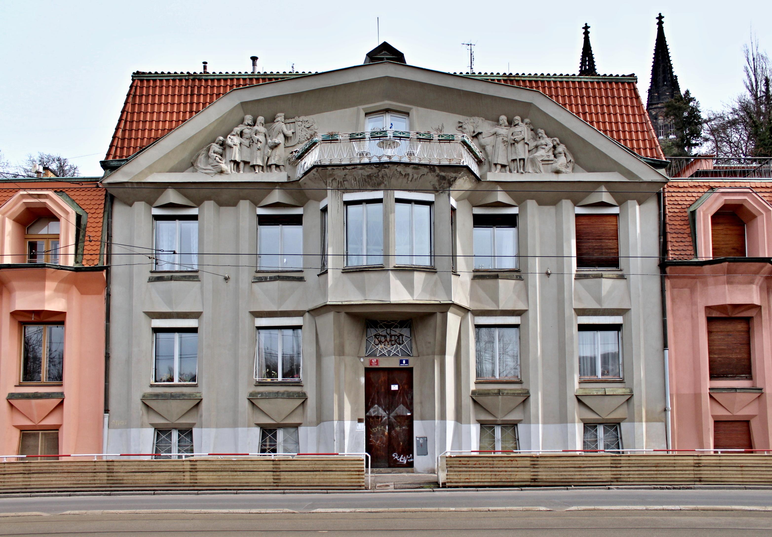 Praha-Vyšehrad, Rašínovo nábřeží